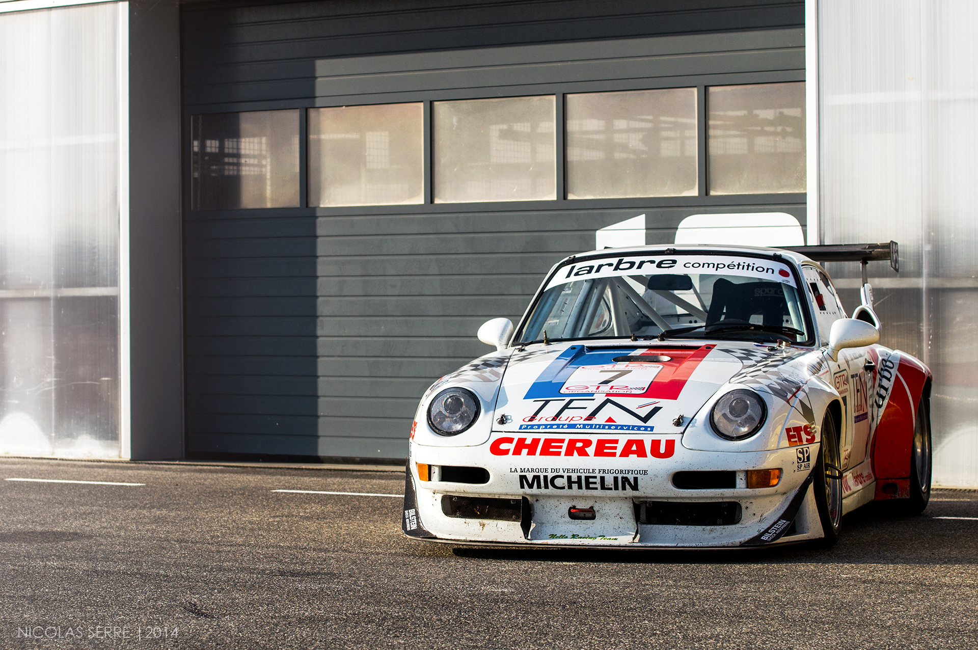 Vendredi 14 Mars 2014 Circuit Paul Armagnac - Nogaro Club ASA Emma Evt Porsche 911 ' 993 ' GT2 1995 - Ex Larbre Compétition